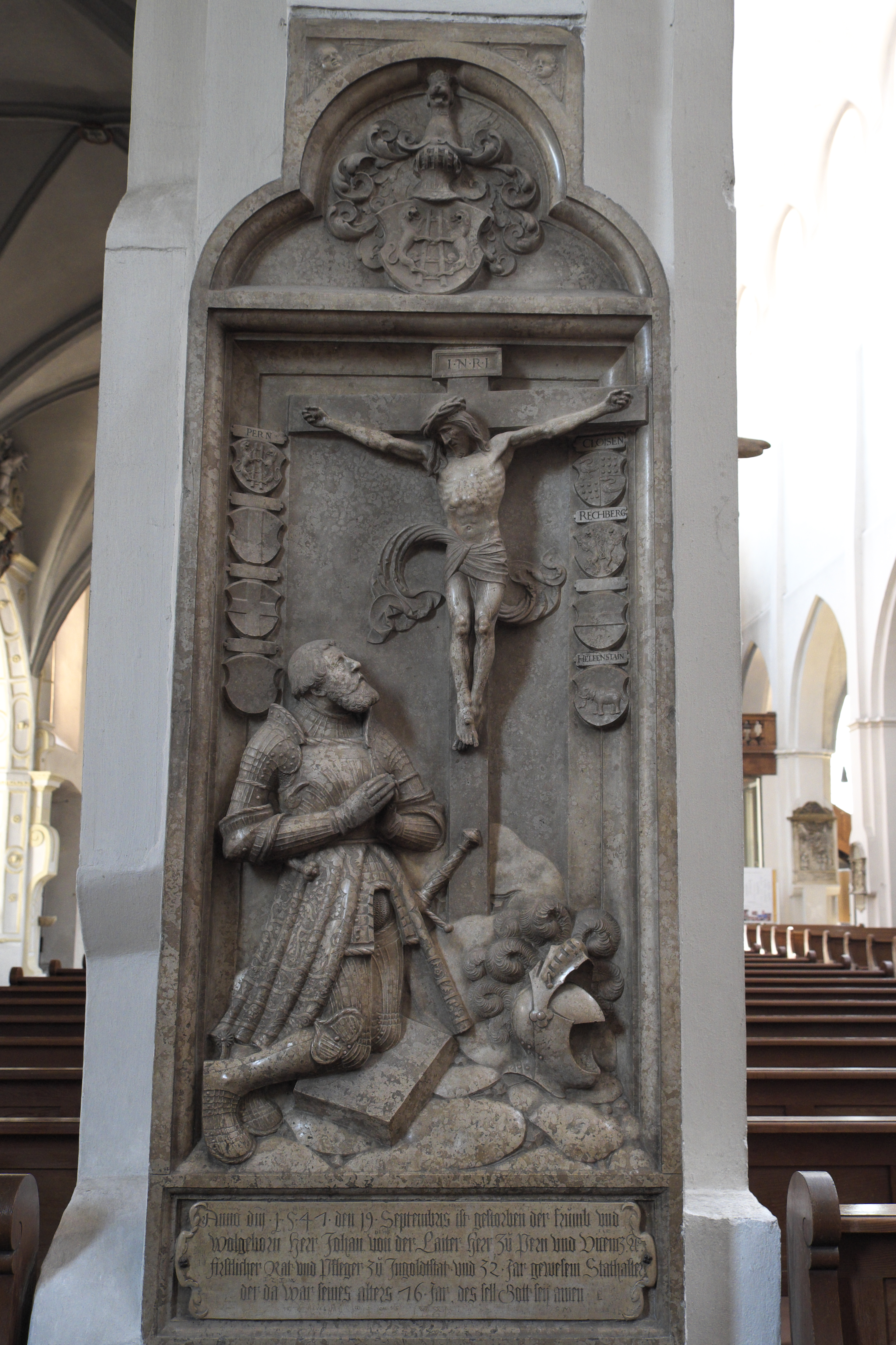 Franziskanerkirche in Ingolstadt (Bayern/Deutschland), Epitaph für Johann von der Leiter, von 1571, von Loy Hering